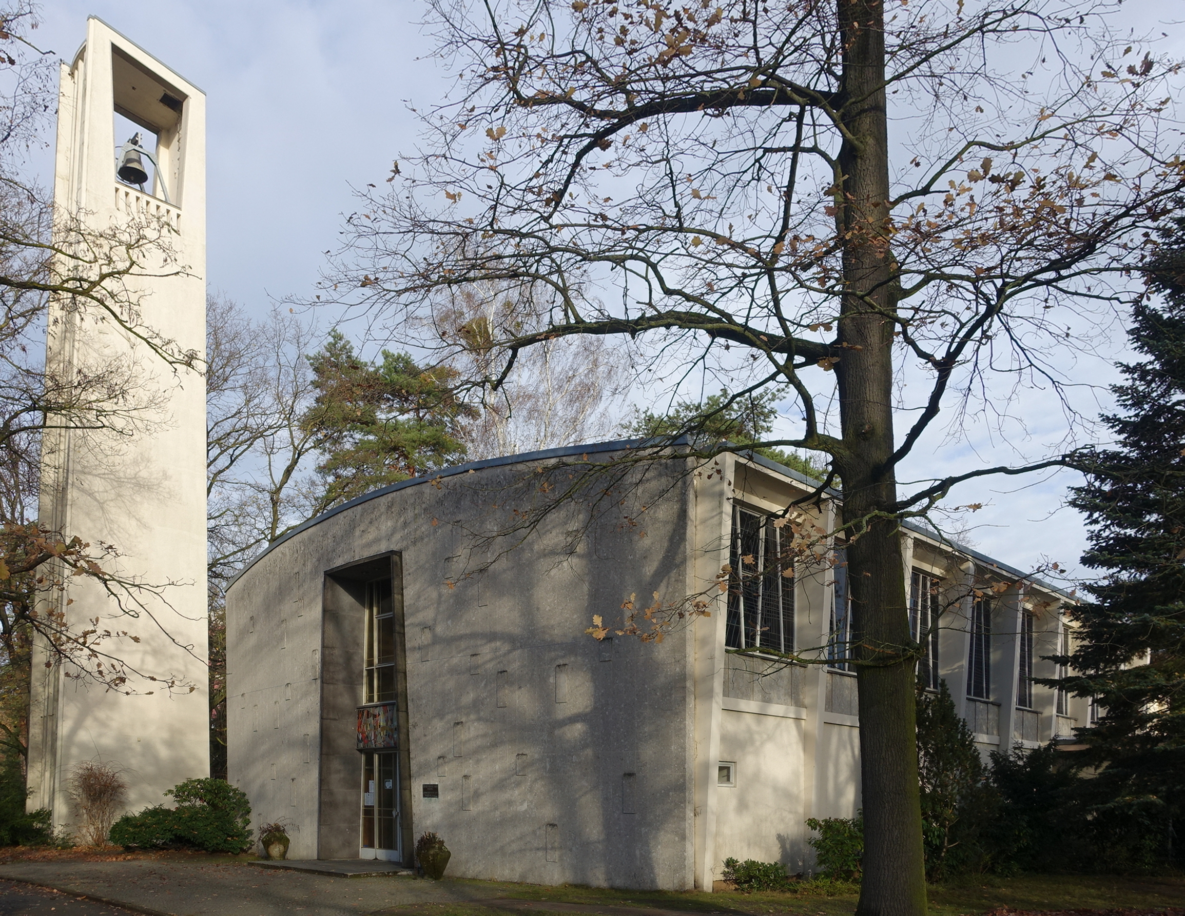 Blick auf die "All Saints Church"